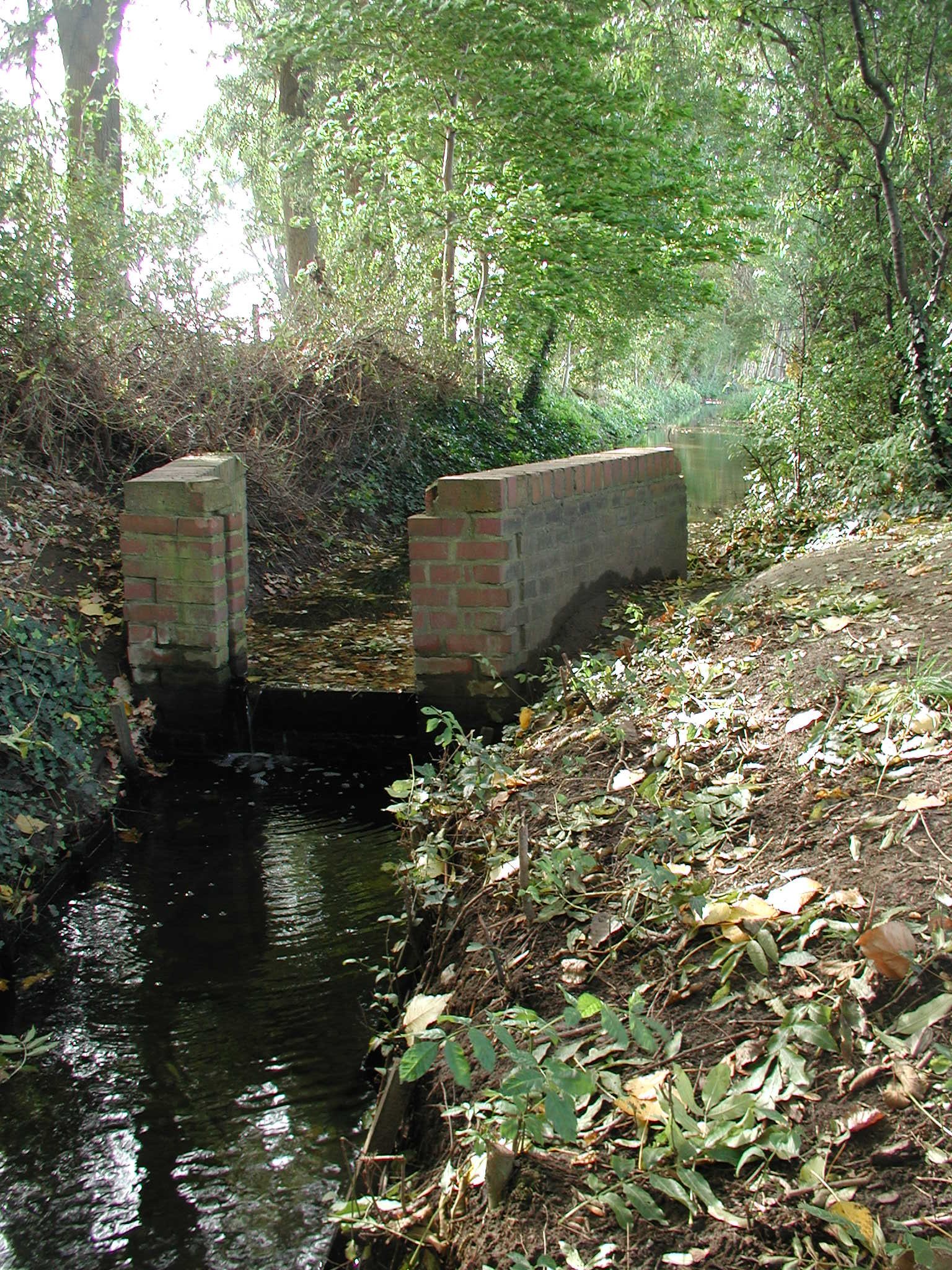 Hürth-Sielsdorf, Verlauf des Gleueler Baches am Ortsrand neben dem Hubertushof